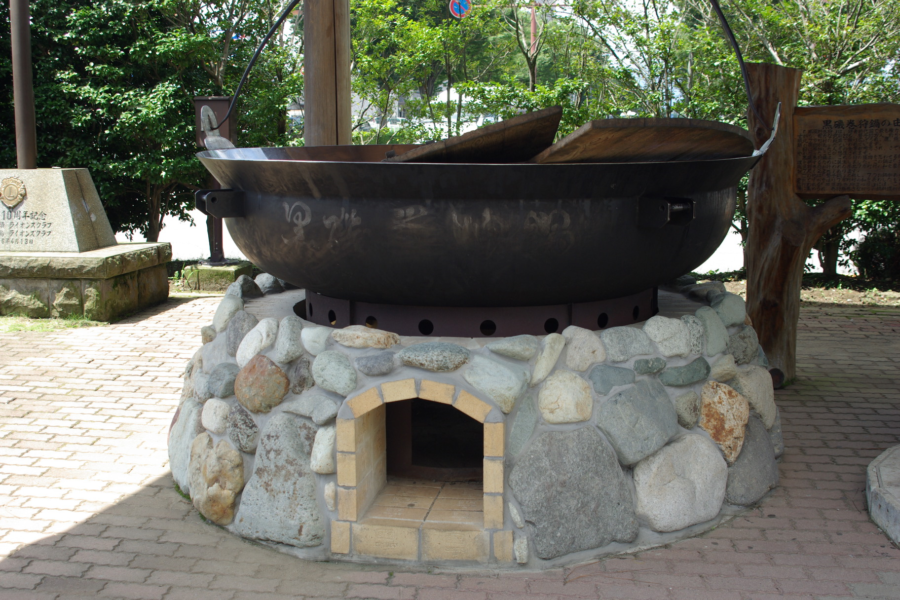 那須塩原駅前にある巻狩鍋